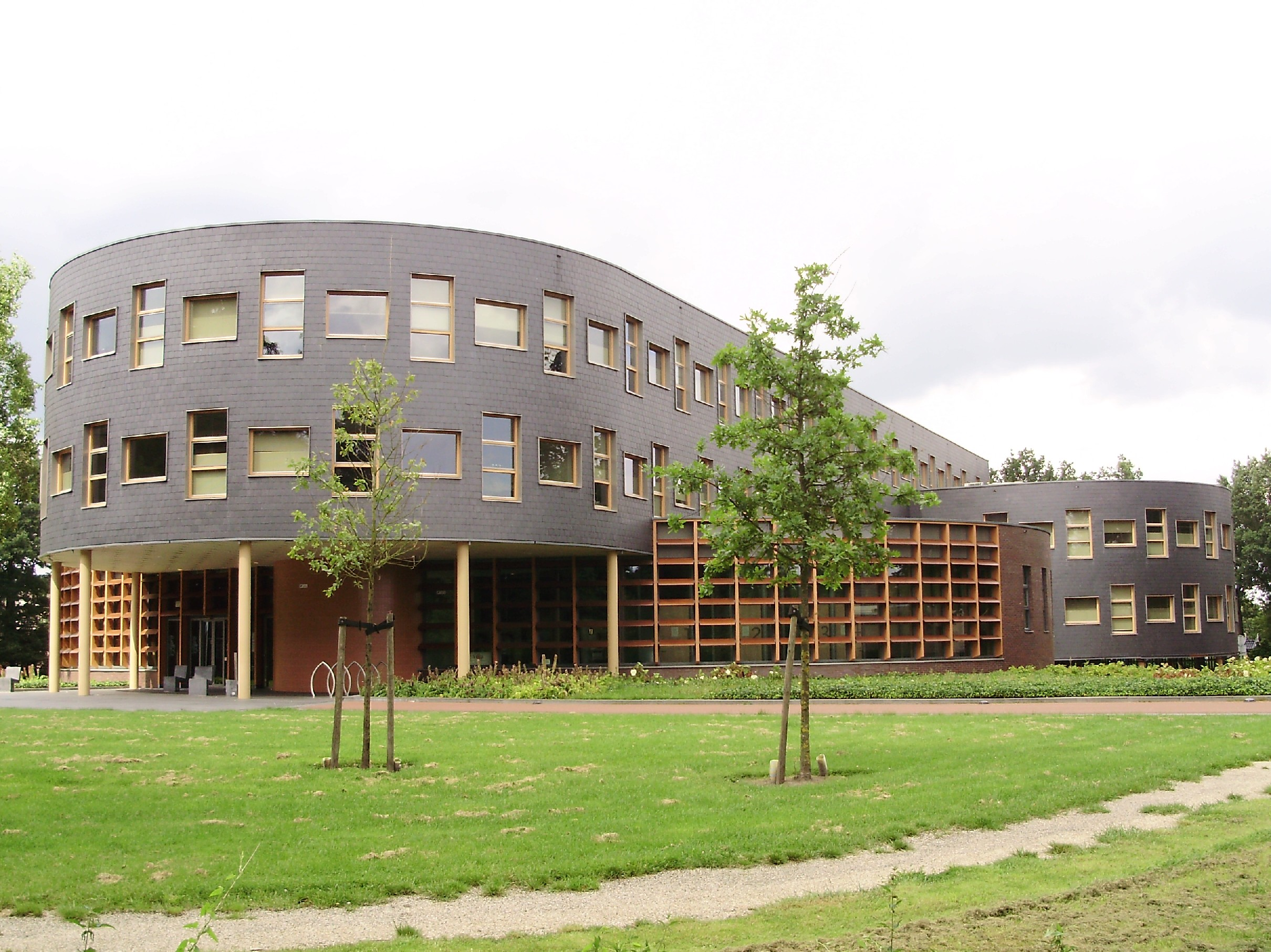 Gemeentehuis van Ooststellingwerf in Oosterwolde (provincie Friesland, Nederland)